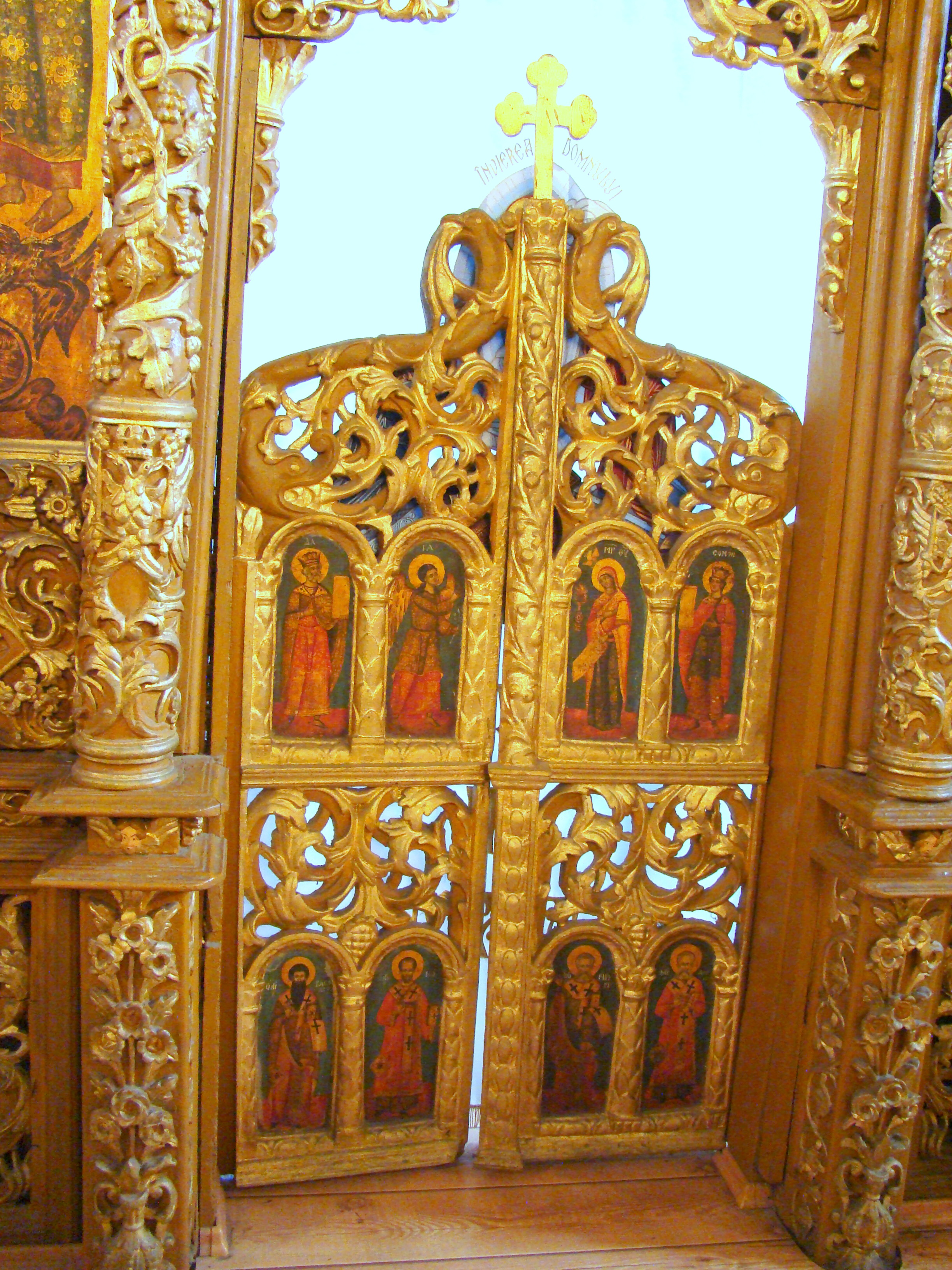 Biserica ortodoxă „Sf. Arhangheli Mihail și Gavriil”, sat Vadu Crișului; comuna Vadu Crișului